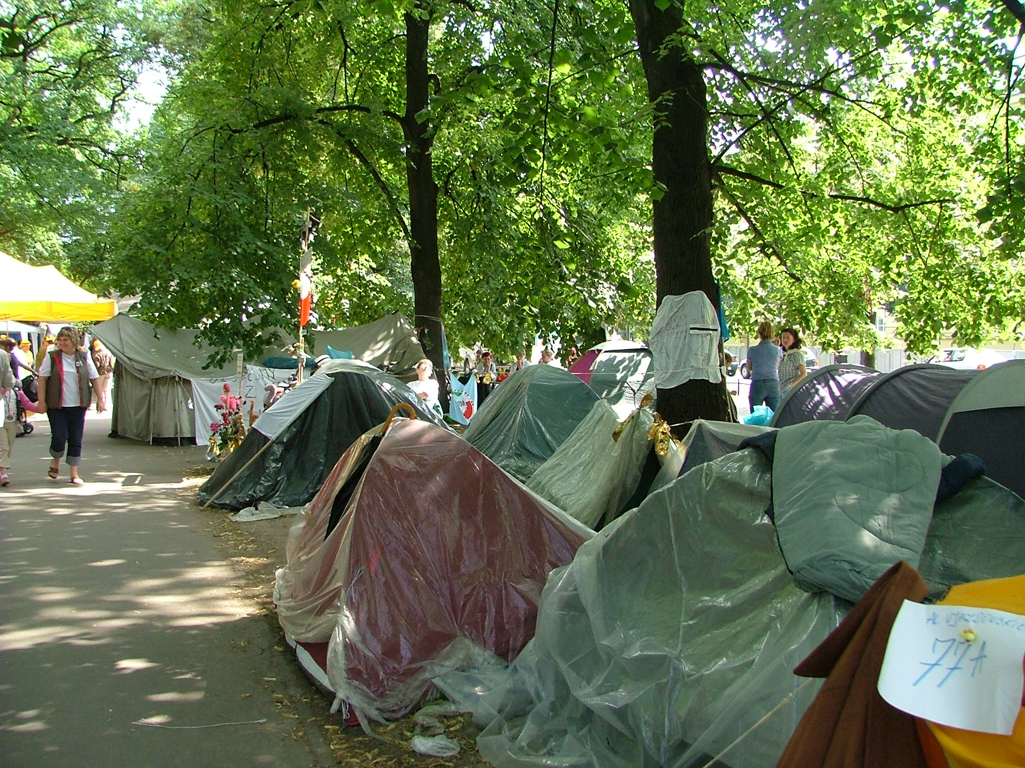 PL, Warsaw, Poland, Al. Ujazdowskie, Protest pielęgniarek